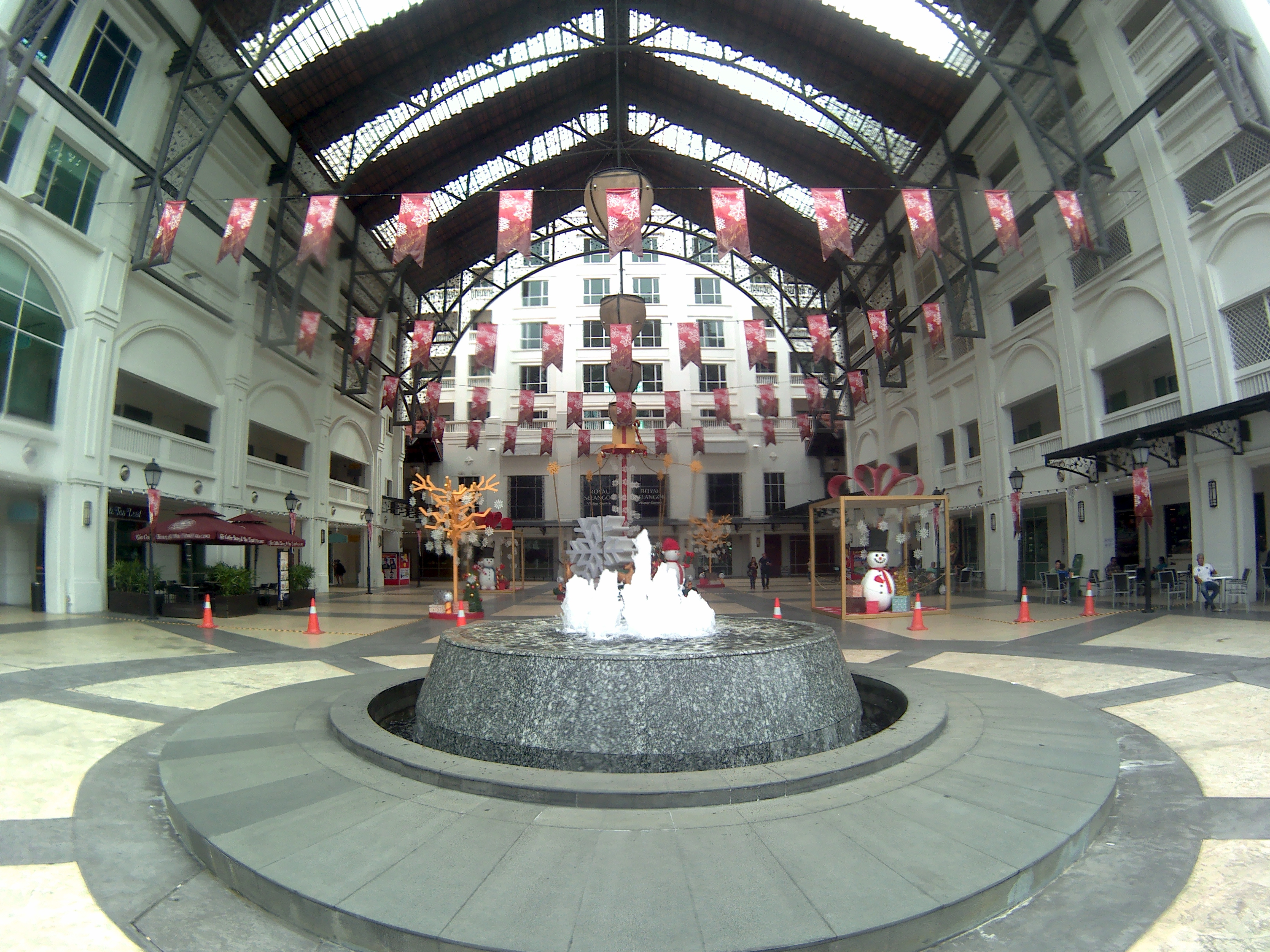 海峡岸广场